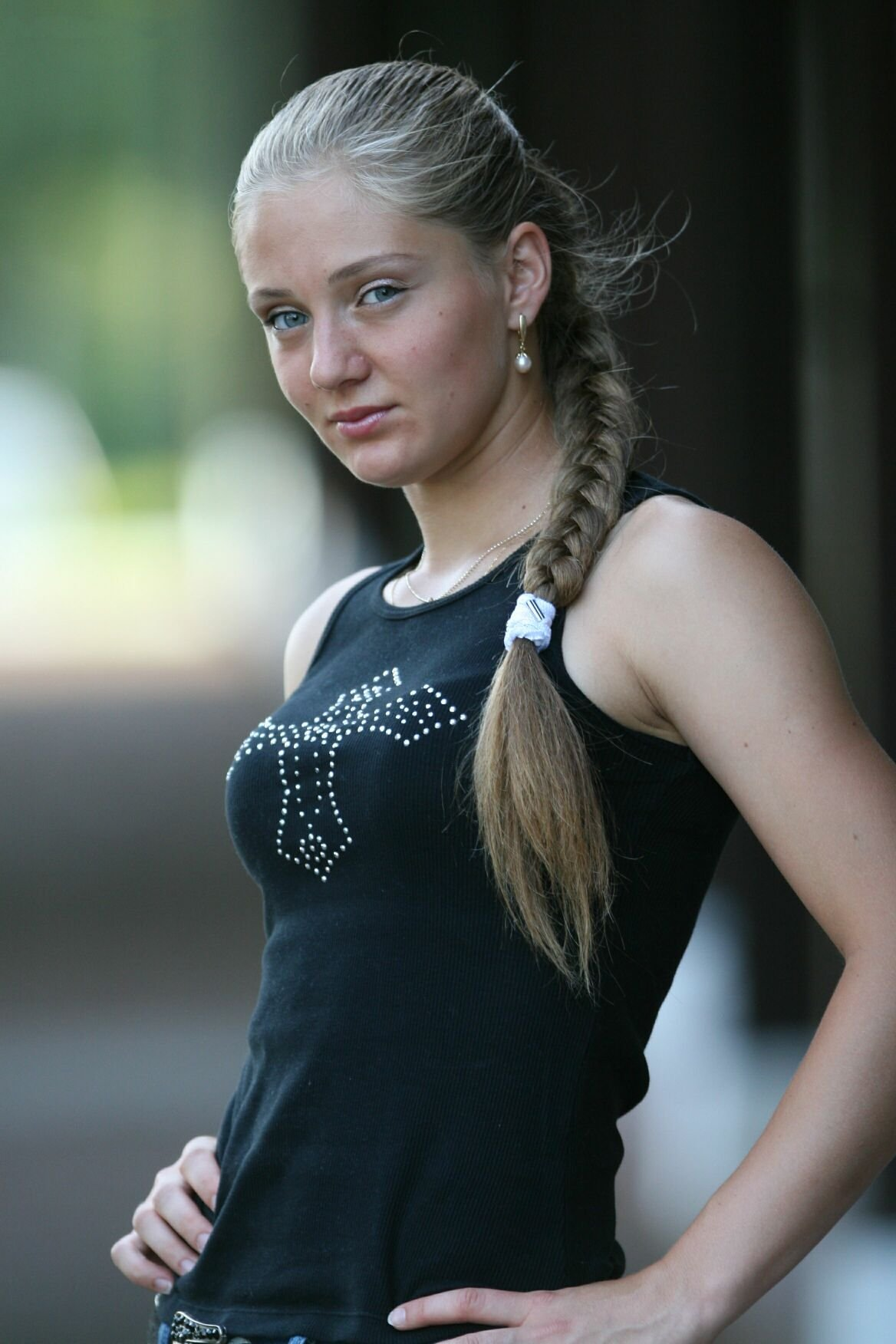 Anna Chakvetadze in 's Hertogenbosch 2007